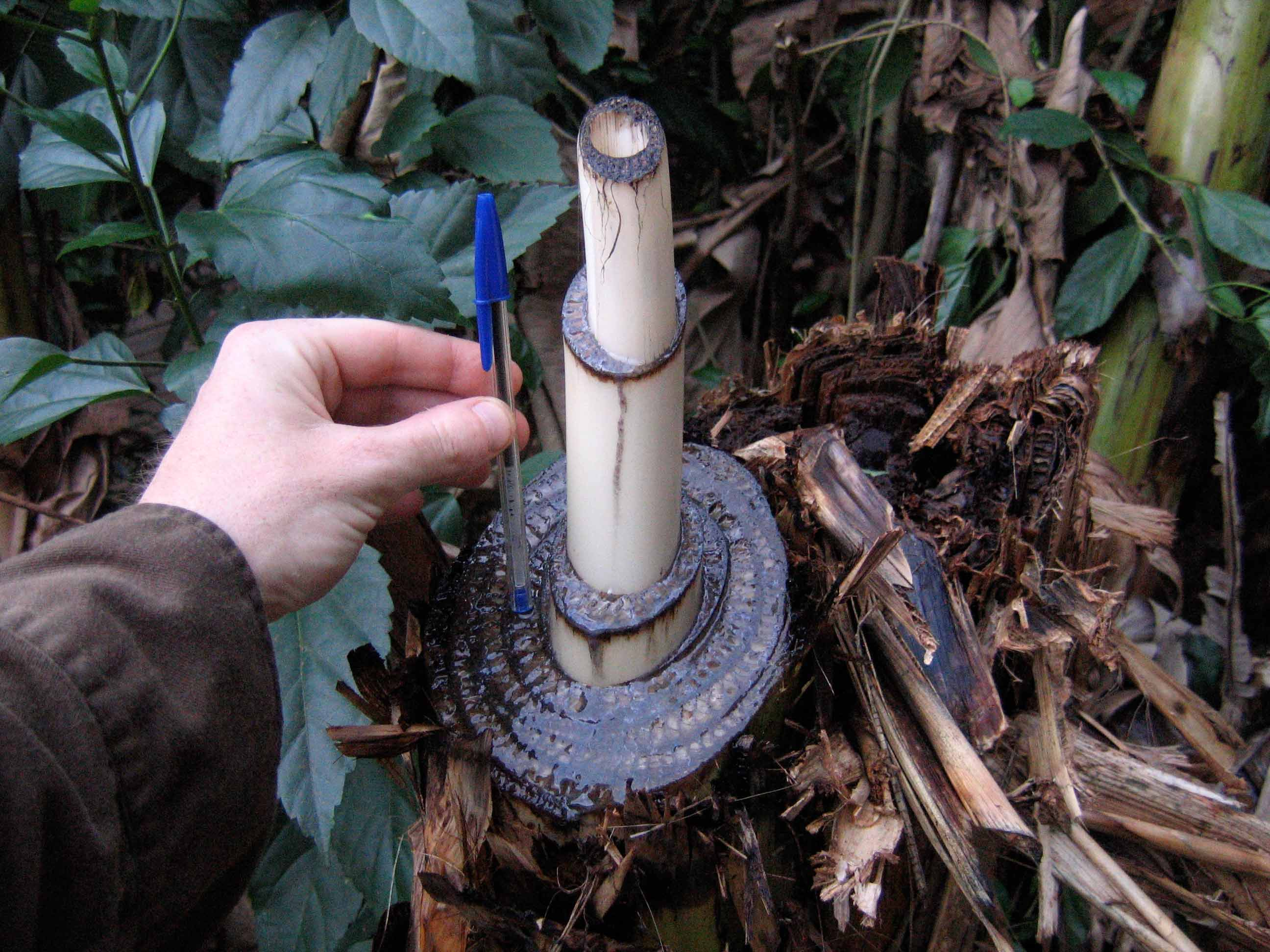 Hauteur atteinte par une pousse de bananier en 24 heures.